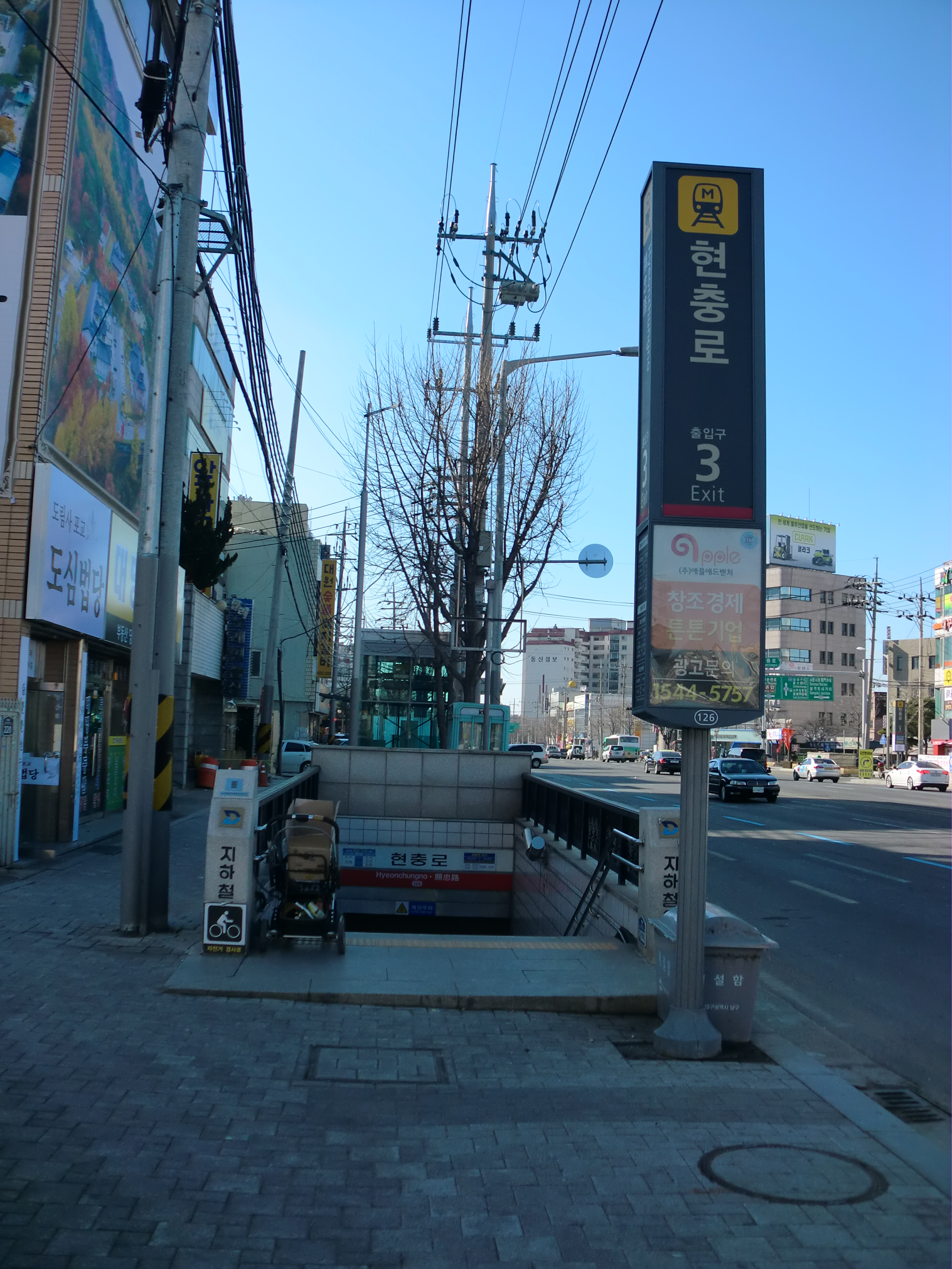 대구도시철도 1호선 현충로역 2번출입구